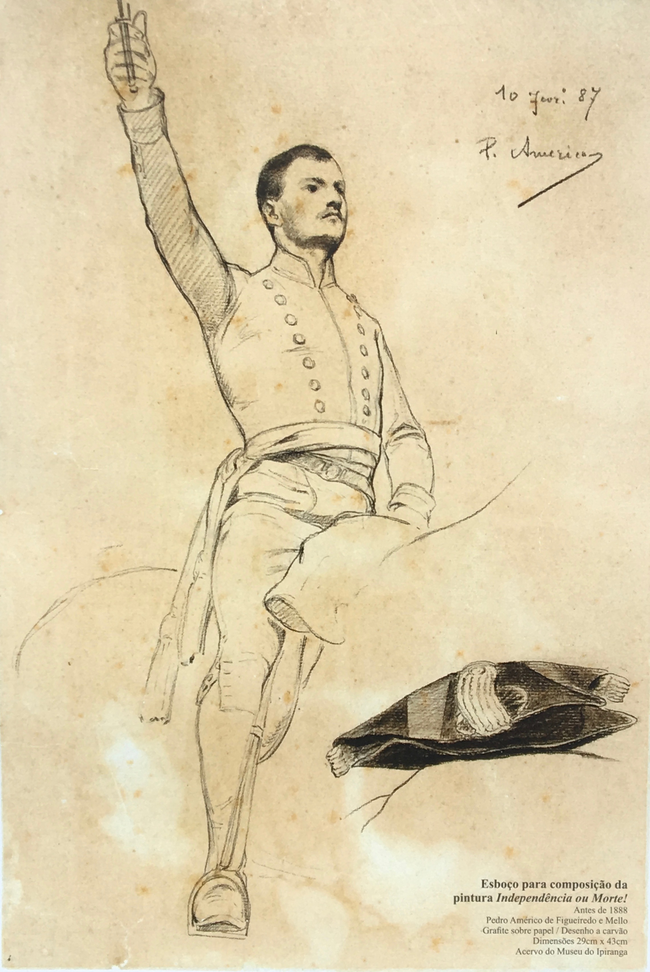 x